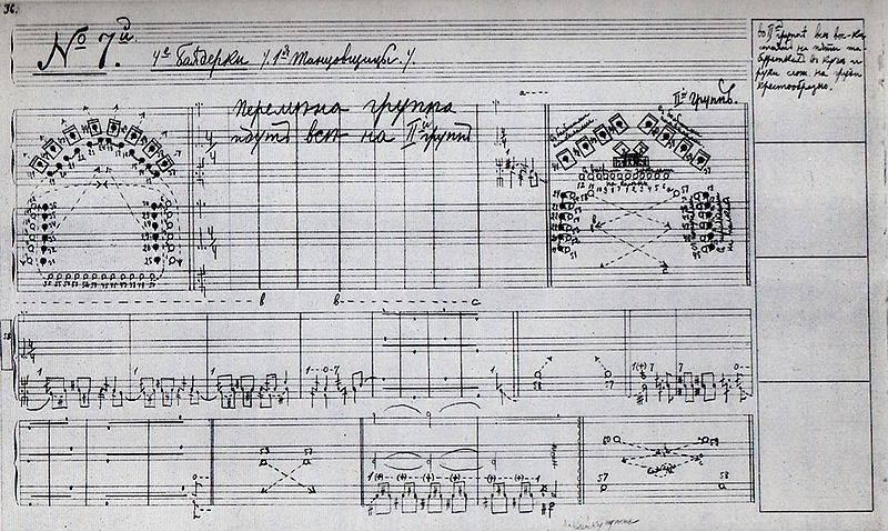 Une page de notation du mouvement apportées par Stépanov